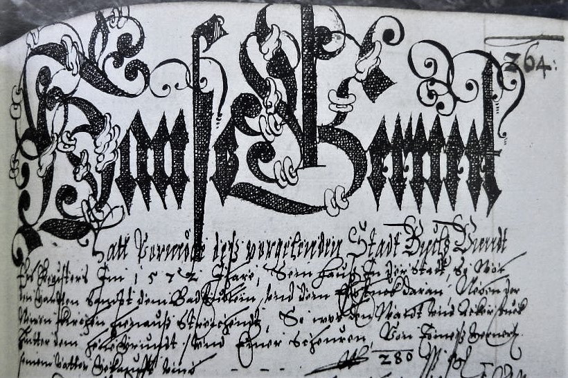 Initiale H und G Varianten um 1572 mit Perlen eingeschnürte Buchstaben